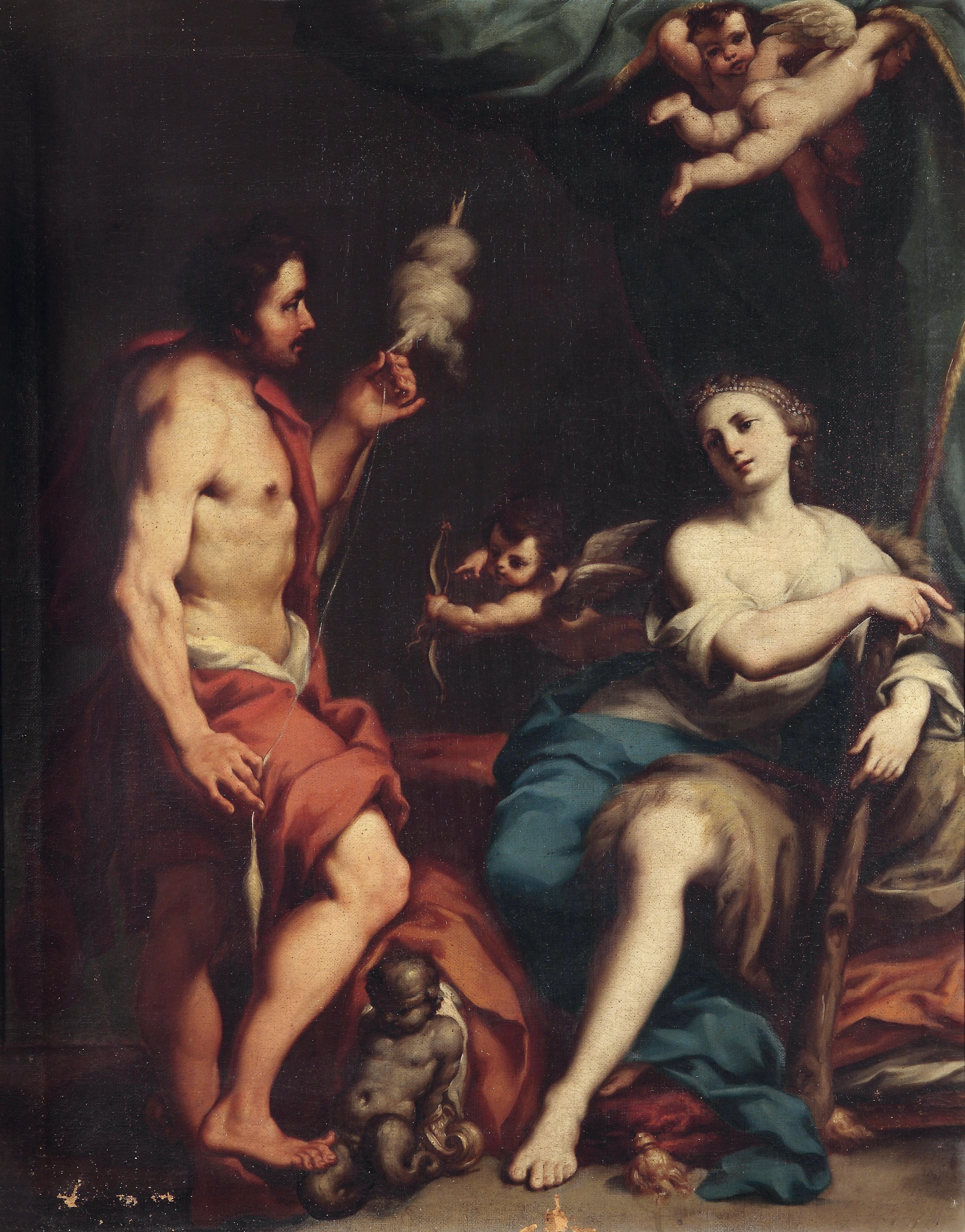 Herkules and Omphale